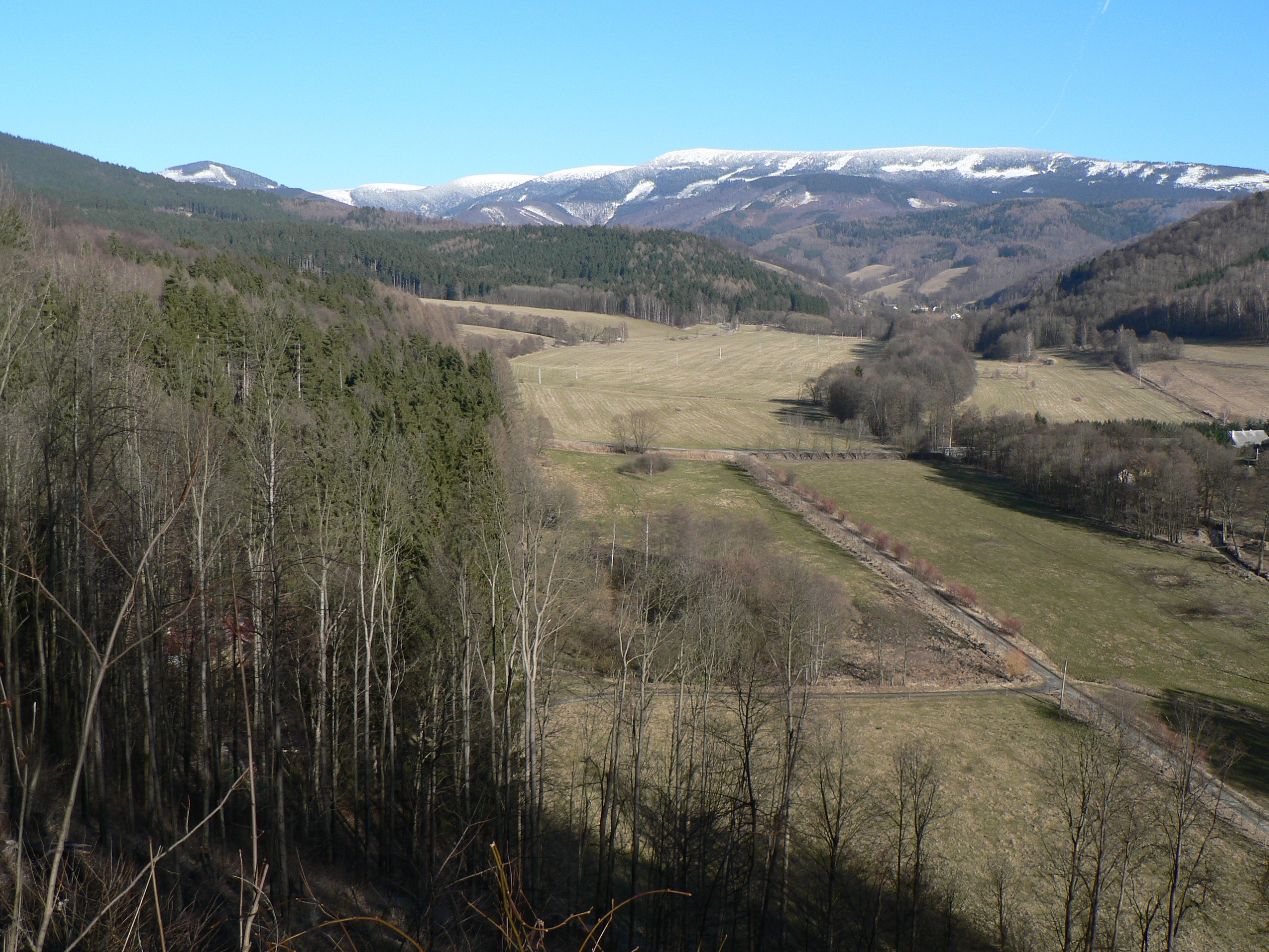 Jižní hřeben Hrubého Jeseníku z vyhlídky nad Sobotínem. Úplně vlevo vrchol Homole, za ním zasněžené vrcholy (zleva) Vysoká Hole, Velký Máj, Jelení hřbet a Břidličná s táhlým hřebenem k Pecnému a Ztraceným kamenům (pyramida na konci hřebene)